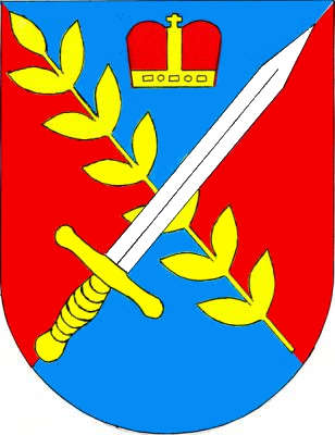 Suchonice znak